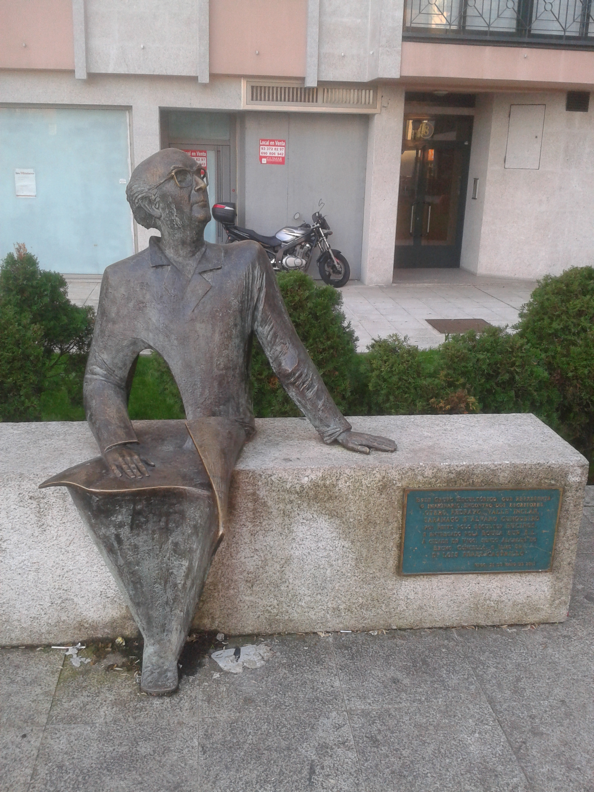 José Saramago Bouzas (vigo) en urbanización Refrey.jpg